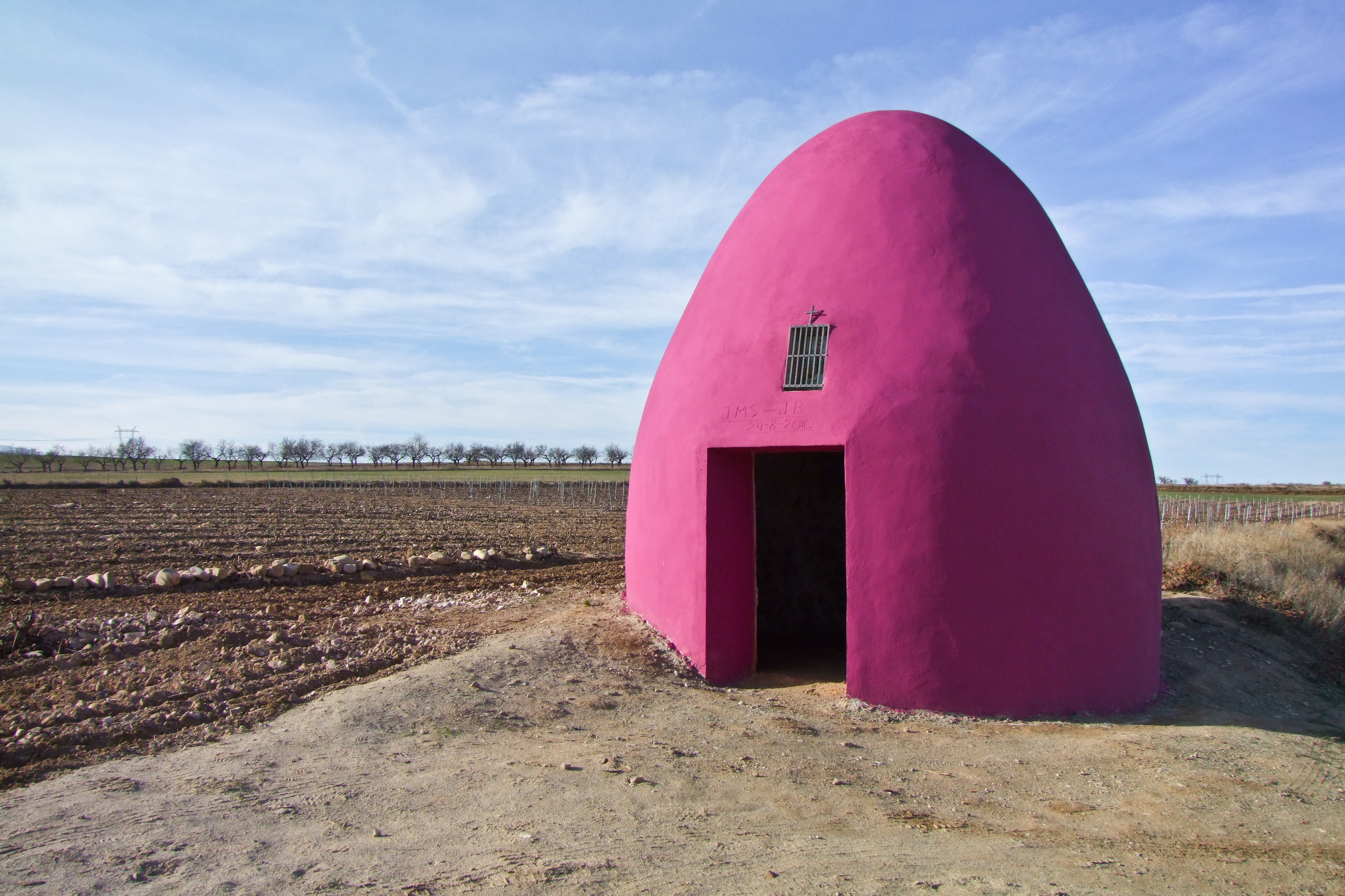 Oratorio de San Isidro-El Villar de Arnedo-17843.jpg